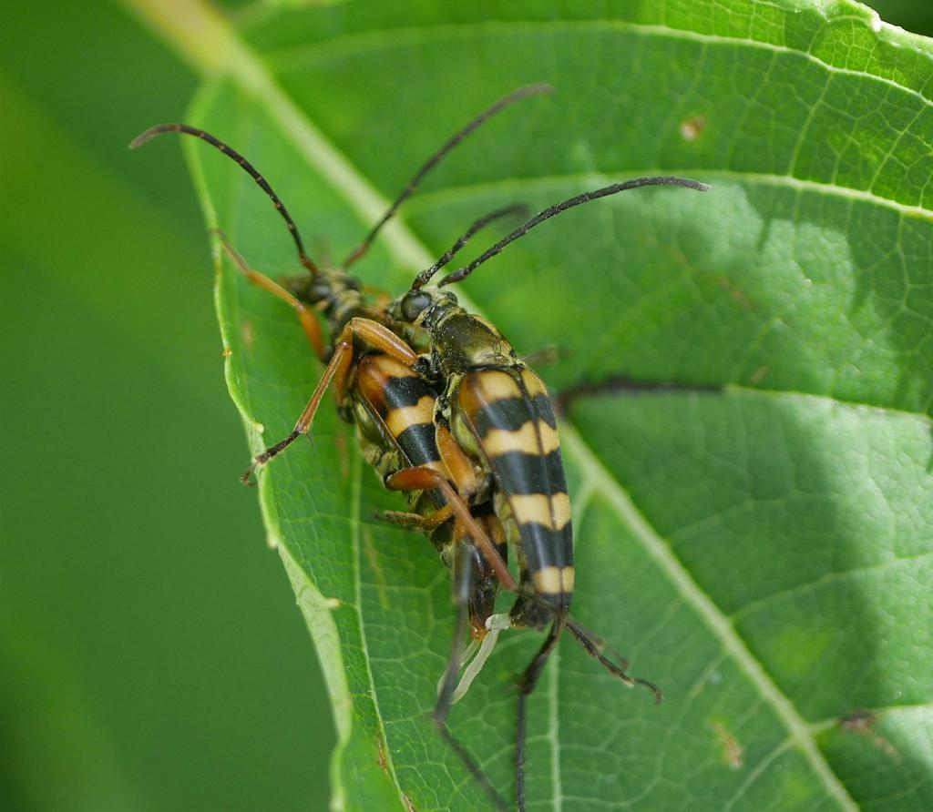 Leptura ochraceofasciata：ヨツスジハナカミキリ 2018/07/21 和歌山県高野山：Kouyasan Wakayama Pref. Japan